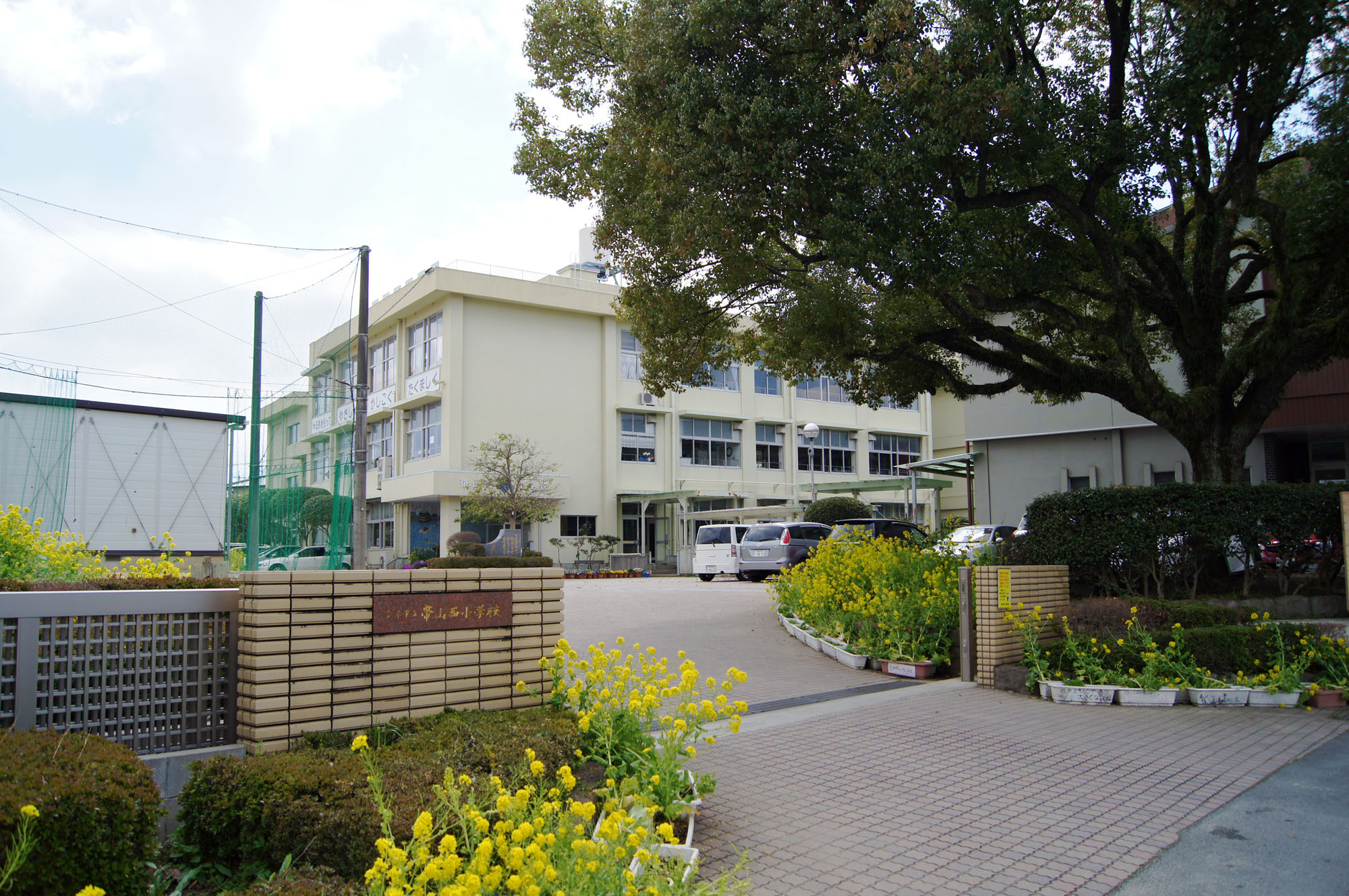 熊本市立帯山西小学校